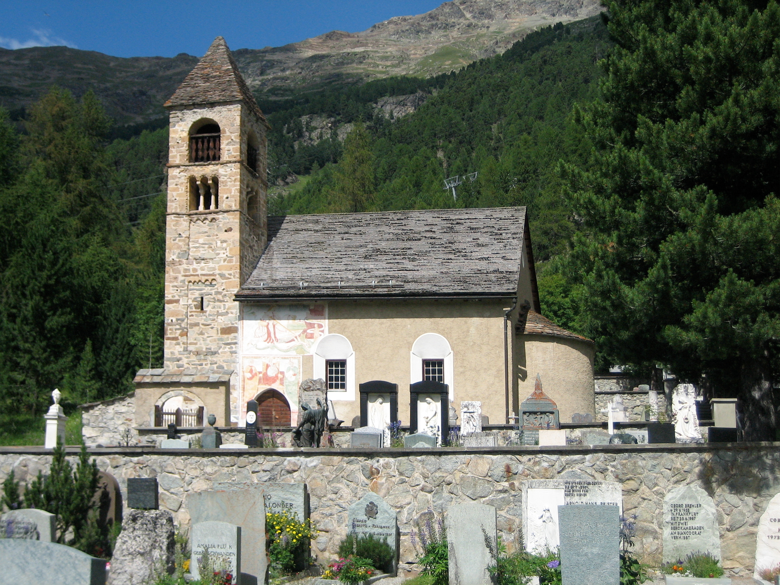 Die Kirche Sta. Maria in Pontersina